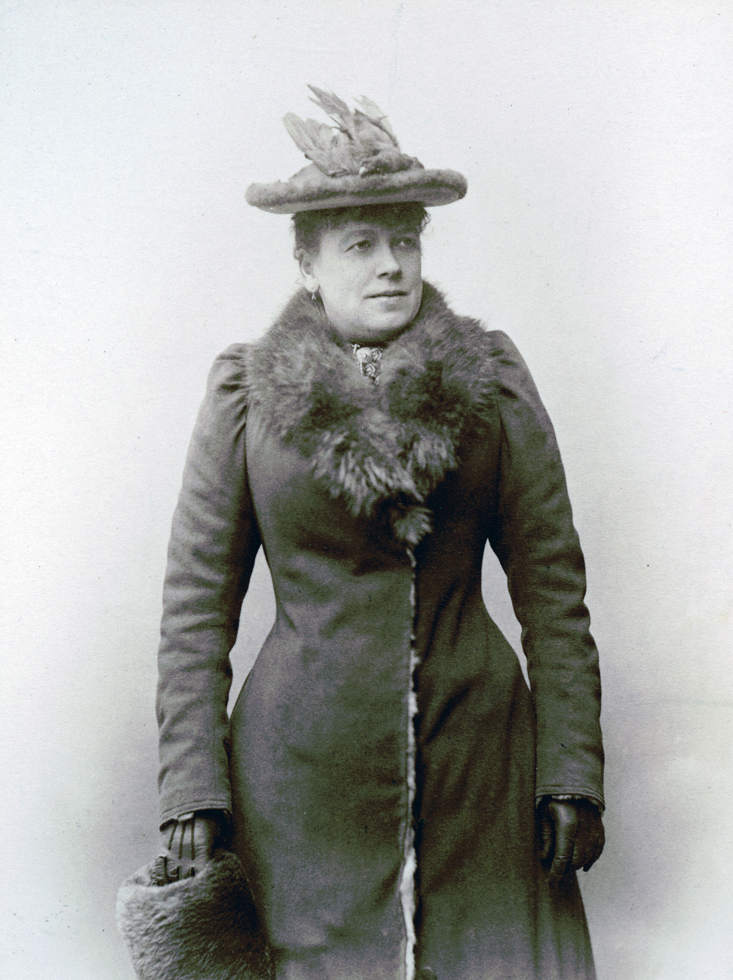 Erika Törnberg, skådespelare vid Folkteatern i Stockholm 1893